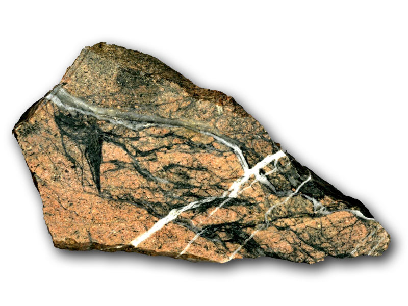 Fragment de pseudotachylite du cratère d'impact de Rochechouart (France). Pseudotachylite (Chapagnac) Les pseudotachylites sont formées sous l'effet d'un choc extrêmement violent, d'un tremblement de terre, ou encore d'une explosion nucléaire. Les roches du terrain qui subit l'onde de choc se déplacent et l'effet combiné de la pression et de la friction fait fondre les matériaux des fragments en déplacement. Ces matériaux en fusion s'écoulent ensuite dans les anfractuosités de la roche.